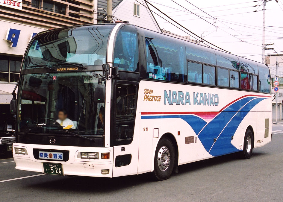 奈良観光 日野セレガ KC-RU4FSCB 富士重7S 低運転席仕様